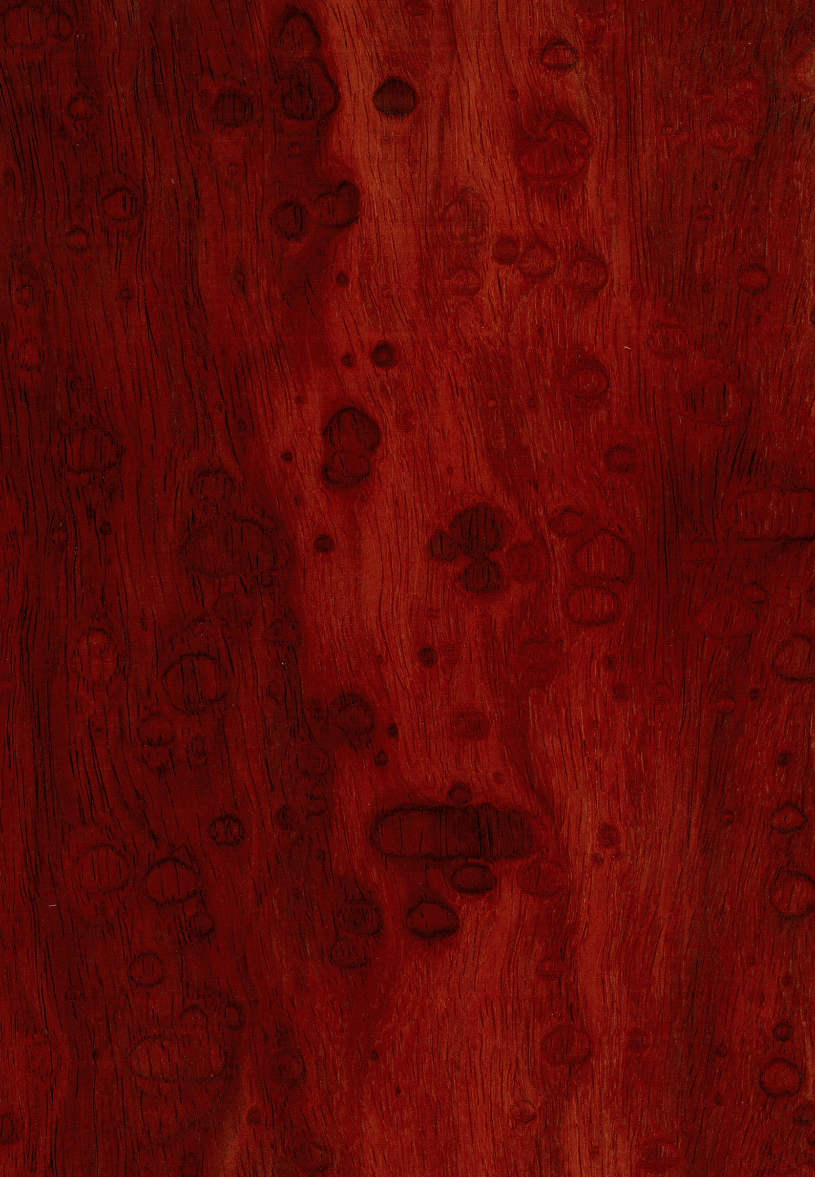 Furnierblatt eines besonderen Edelholzstammes (Padouk, Burmese Rosewood, Pterocarpus indicus) – Paduk mit Splintholz, das gemuschelte oder auch Pommelemaser ist hier eine Besonderheit, dieses Blatt gehört zum selben Stamm wie das andere Bild